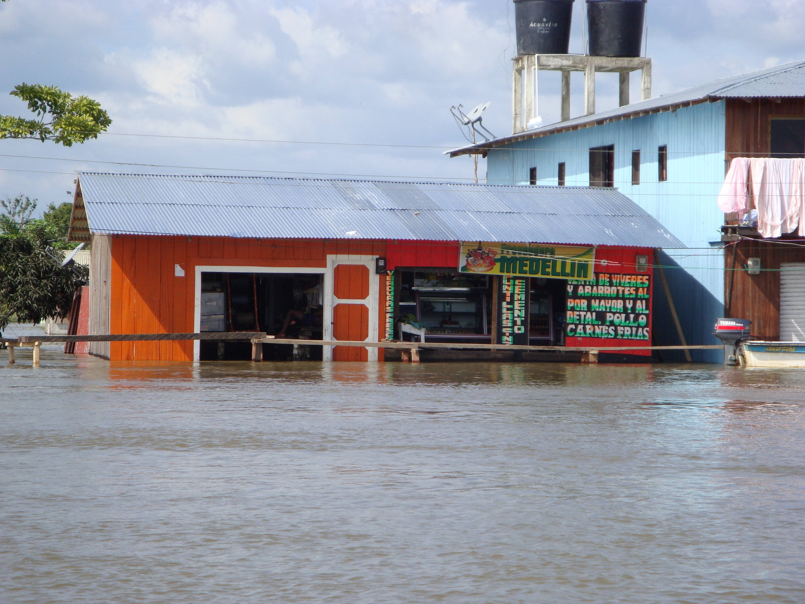 Tienda en El Carmen del Darién.